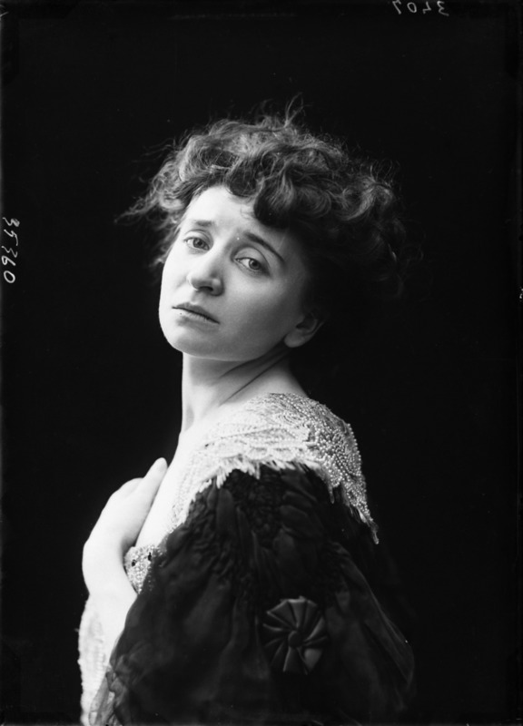 Emma Gramatica fotografata da Mario Nunes Vais